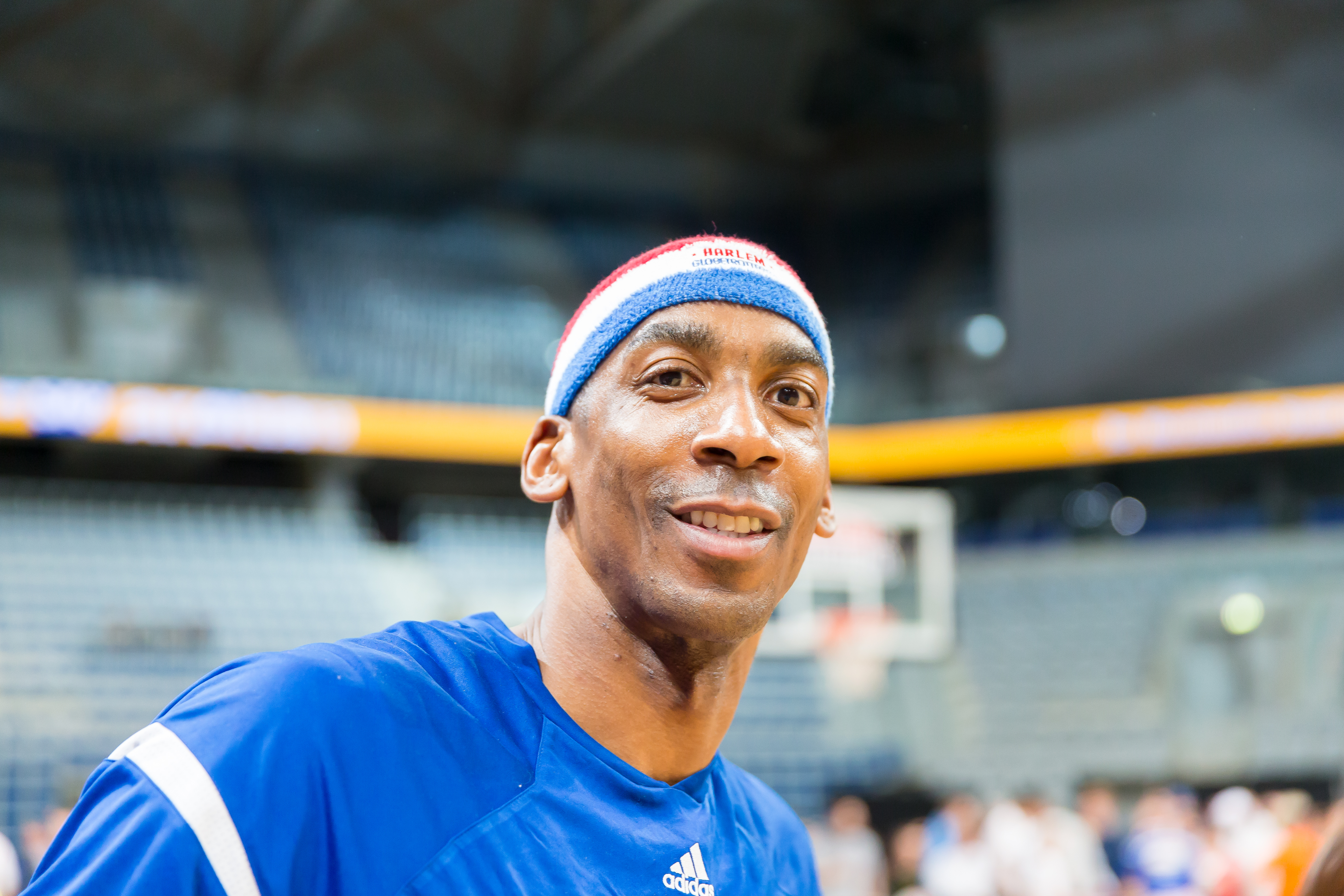 Harlem Globetrotters during Harlem Globetrotters at SAP Arena, Mannheim, Baden-Württemberg, Germany on 2017-03-27, Photo: Sven Mandel